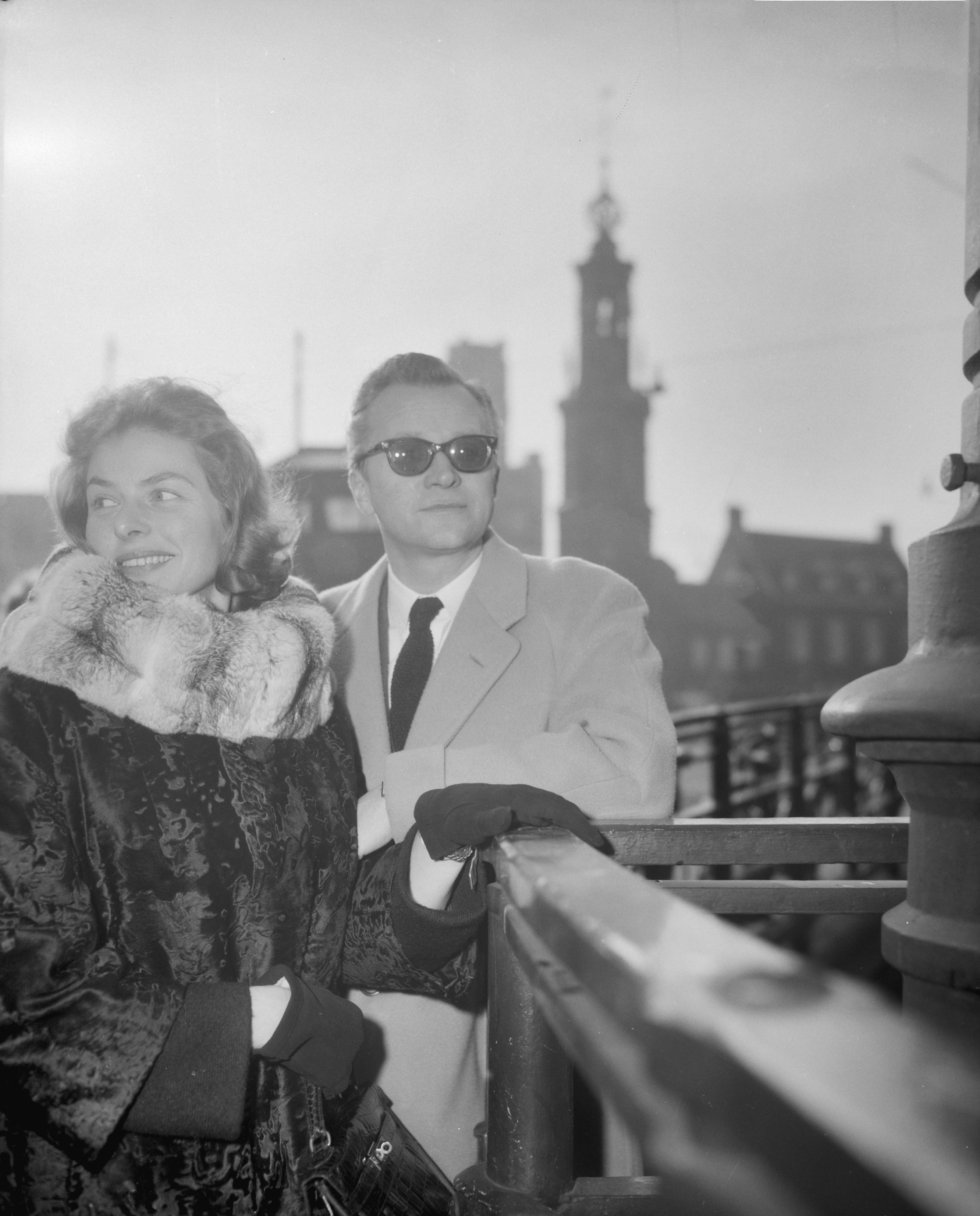 Collectie / Archief : Fotocollectie Anefo Reportage / Serie : [ onbekend ] Beschrijving : Ingrid Bergman en haar man Lars Schmidt in Amsterdam. Op de achtergrond de Munttoren Datum : 1 februari 1960 Locatie : Amsterdam, Noord-Holland Trefwoorden : actrices, filmsterren, torens Persoonsnaam : Bergman, Ingrid, Schmidt, Lars Fotograaf : Behrens, Herbert / Anefo Auteursrechthebbende : Nationaal Archief Materiaalsoort : Negatief (zwart/wit) Nummer archiefinventaris : bekijk toegang 2.24.01.04 Bestanddeelnummer : 910-9939